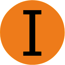 大阪市営地下鉄今里筋地線路線記号